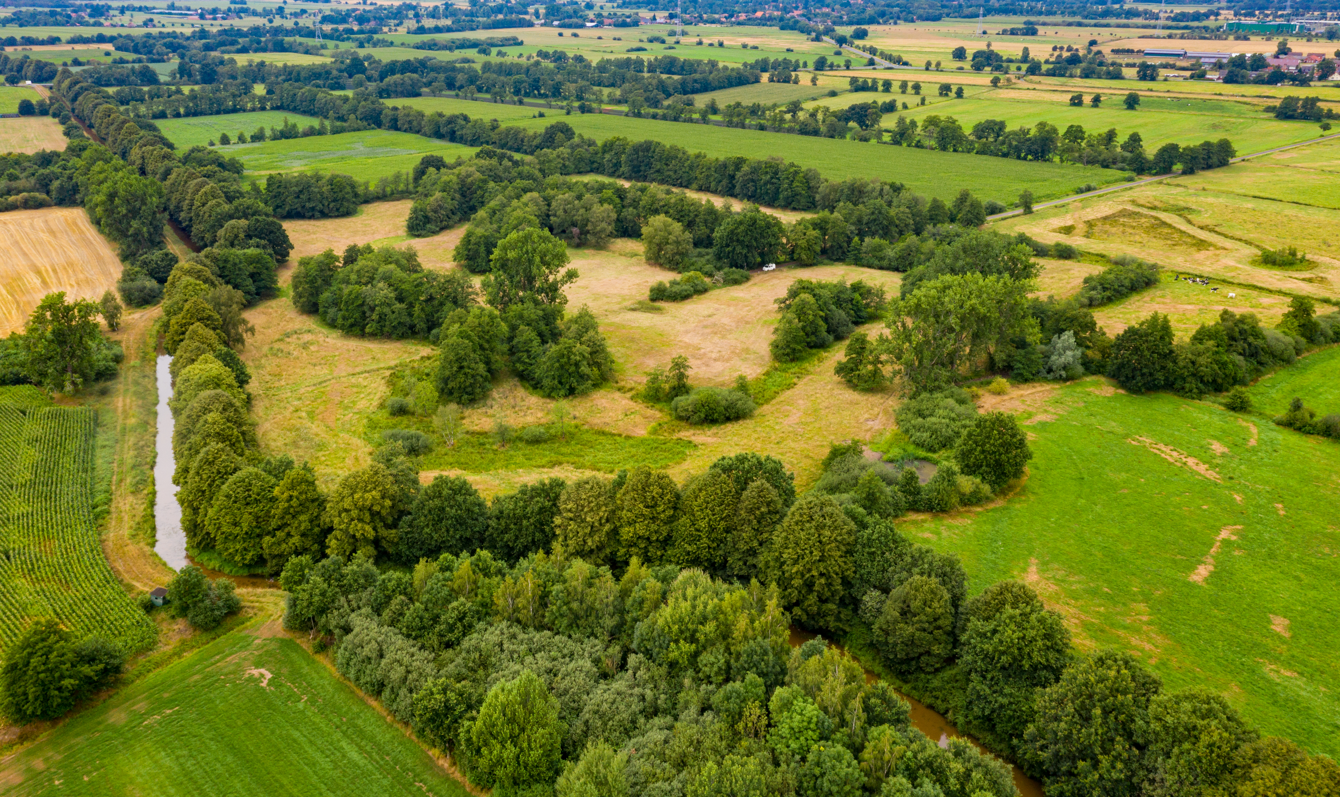 Der Jemgumer Zwinger. Zustand 2019